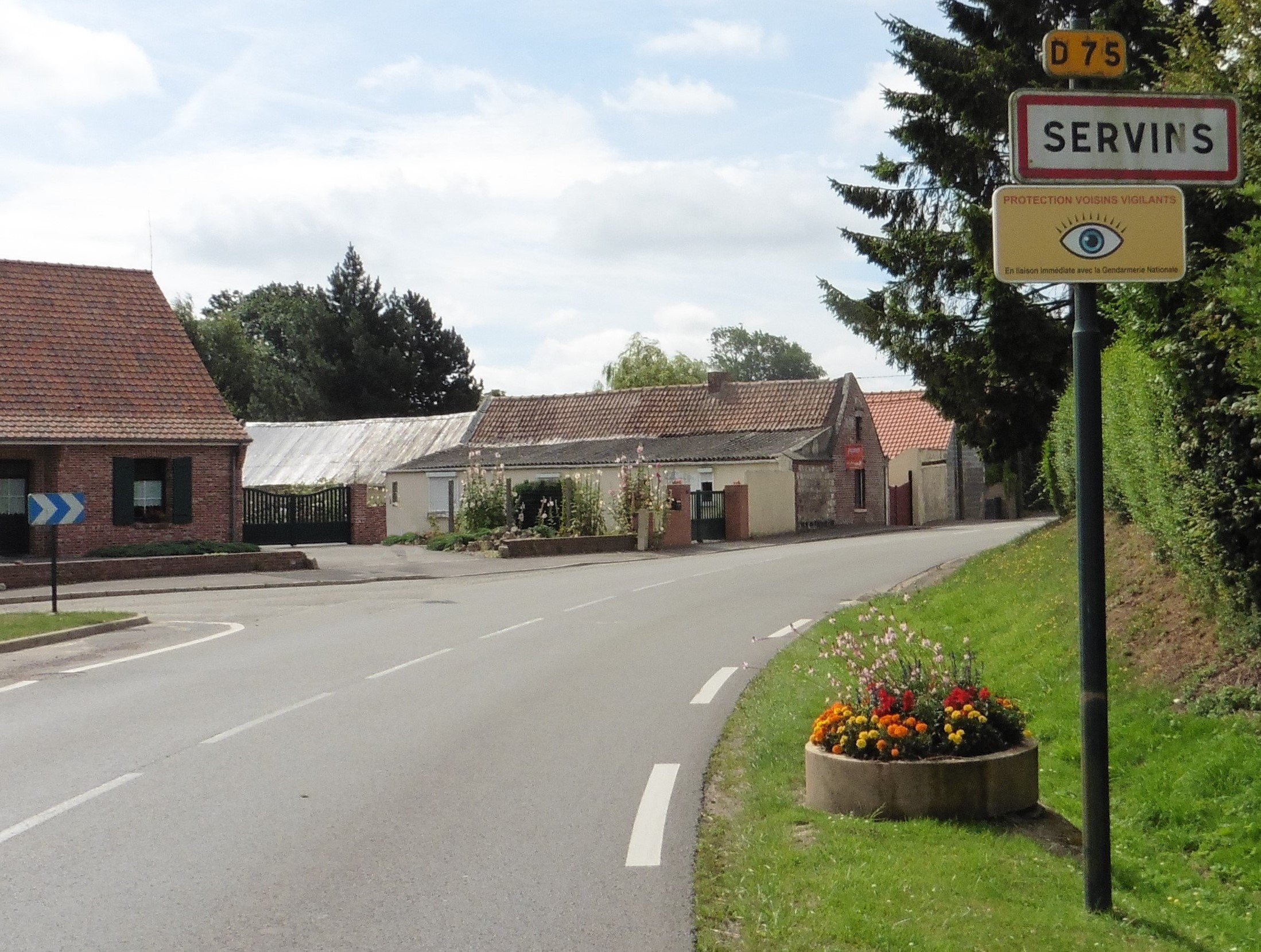 City limit signs Servins dans le Pas-de-Calais Nord-Pas-de-Calais.- France.